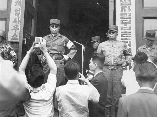 5.16 군사정변 당시 군사혁명위원회 위원장 장도영과 부위원장 박정희